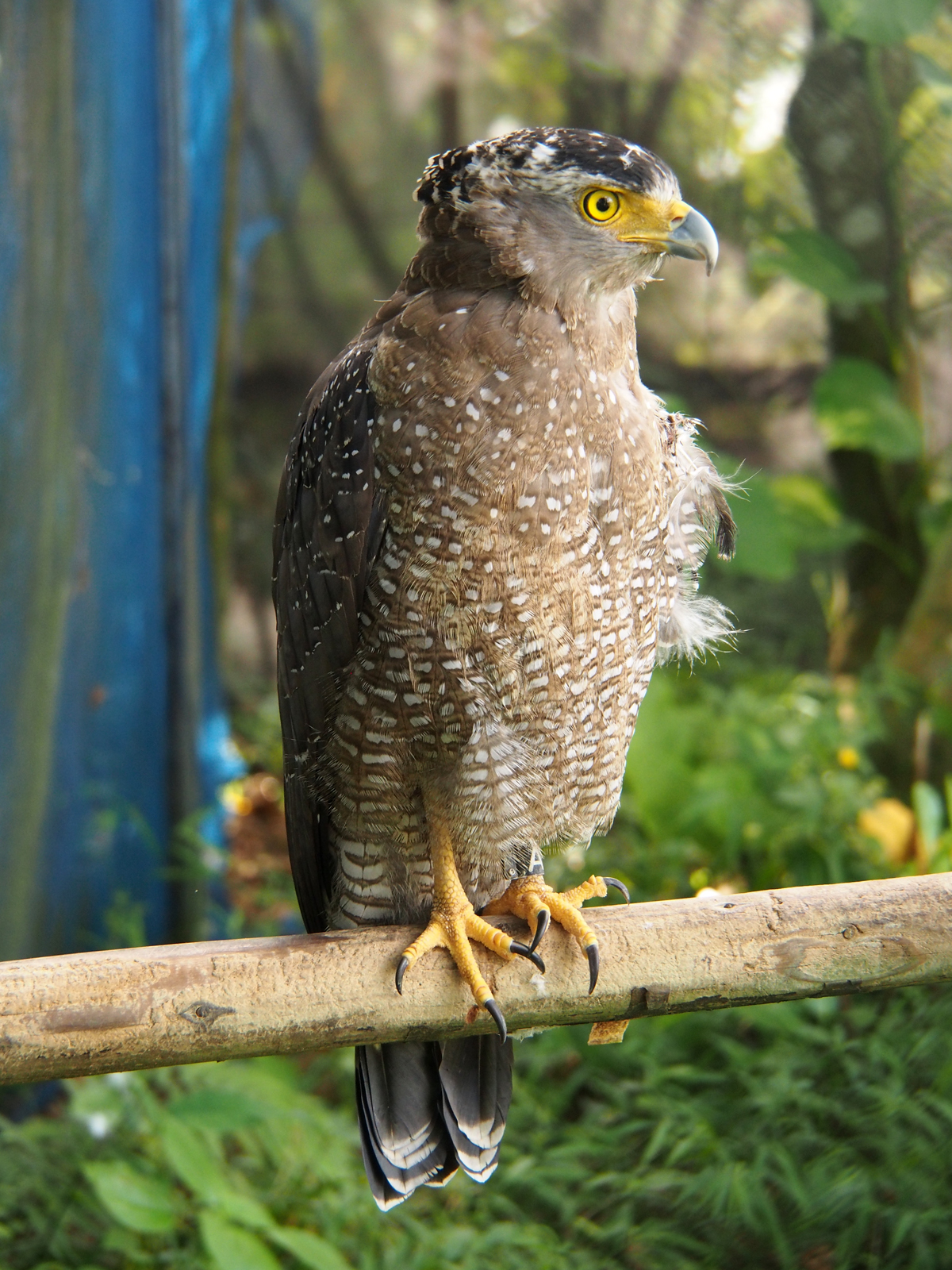 カンムリワシ（沖縄県石垣市石垣やいま村）